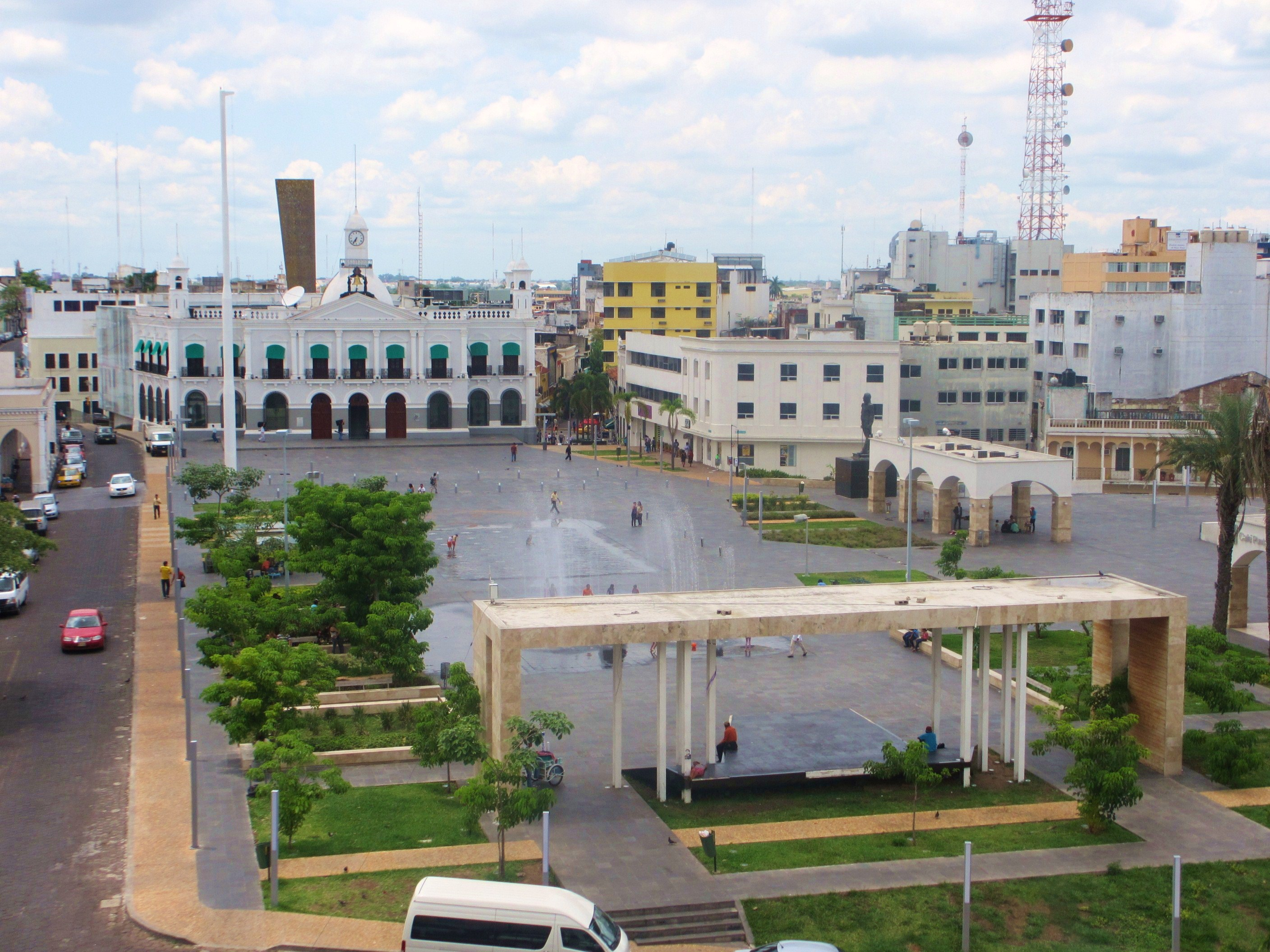 Vista de la Plaza de Armas de la ciudad de Villahermosa desde la torre del campanario de la iglesia de la Inmaculada Concepción. Al fondo se ve el edificio del Palacio de Gobierno de Tabasco. Villahermosa, Tabasco, México.